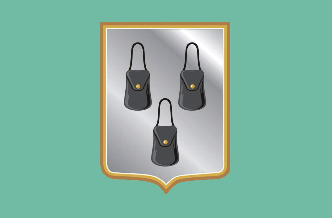 Офіційний прапор міста Суми